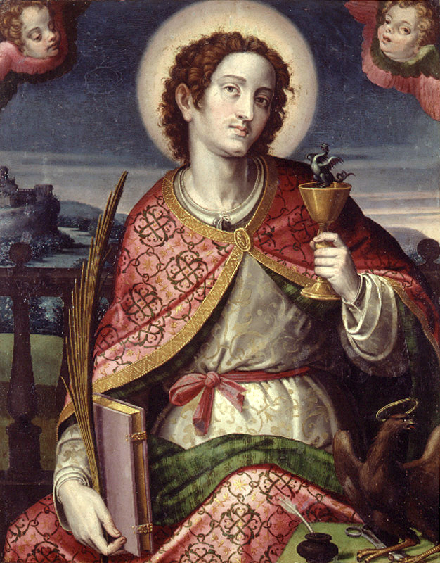 La obra representa a San Juan Evangelista.